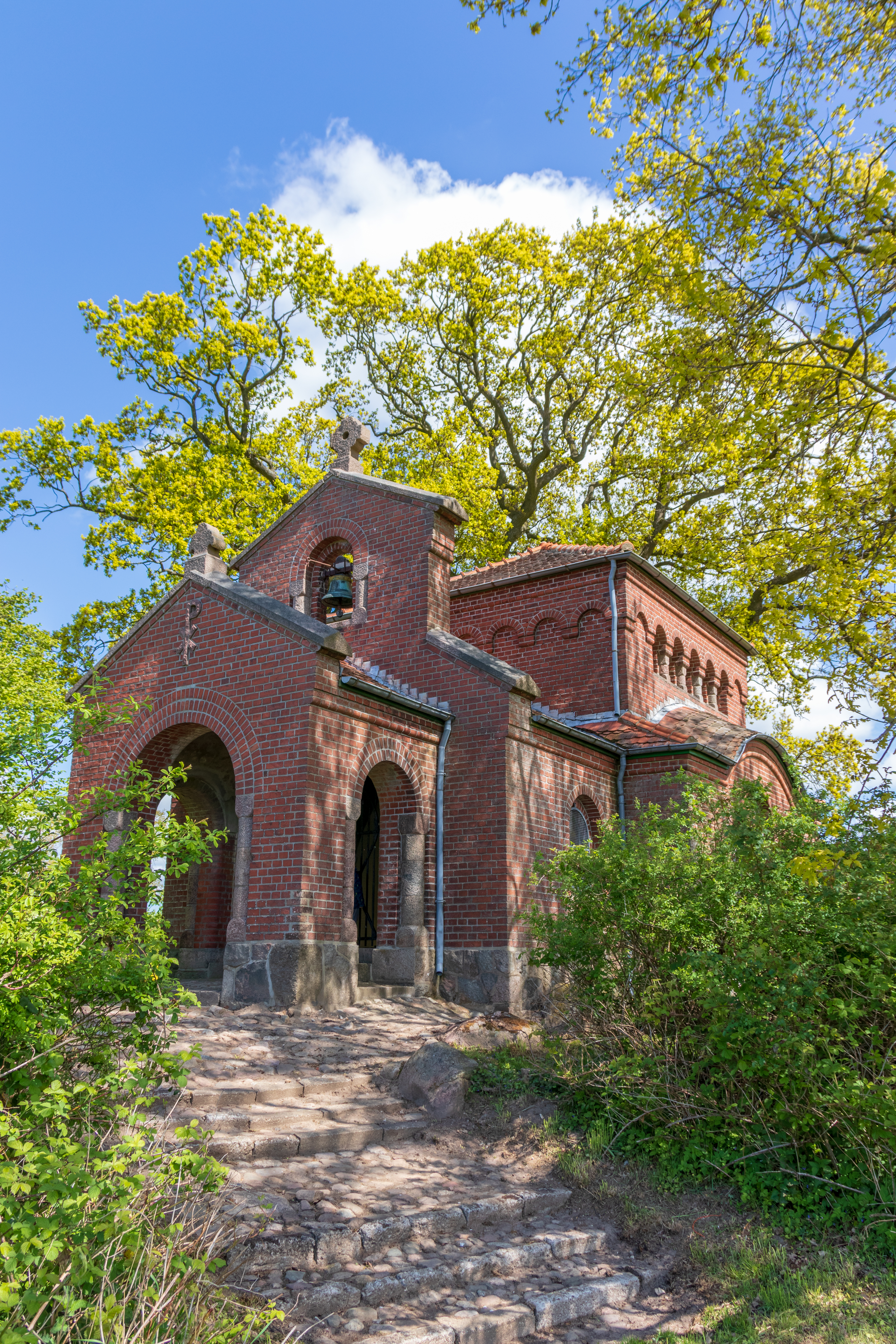 Gut Hemmelmark – Mausoleum des Prinzen Heinrich